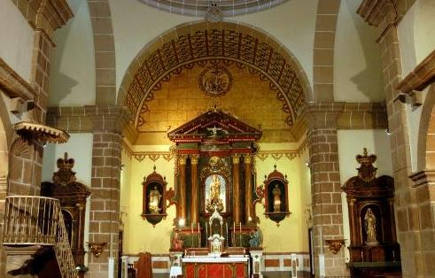 Interior de la Iglesia del Carmen de Mérida